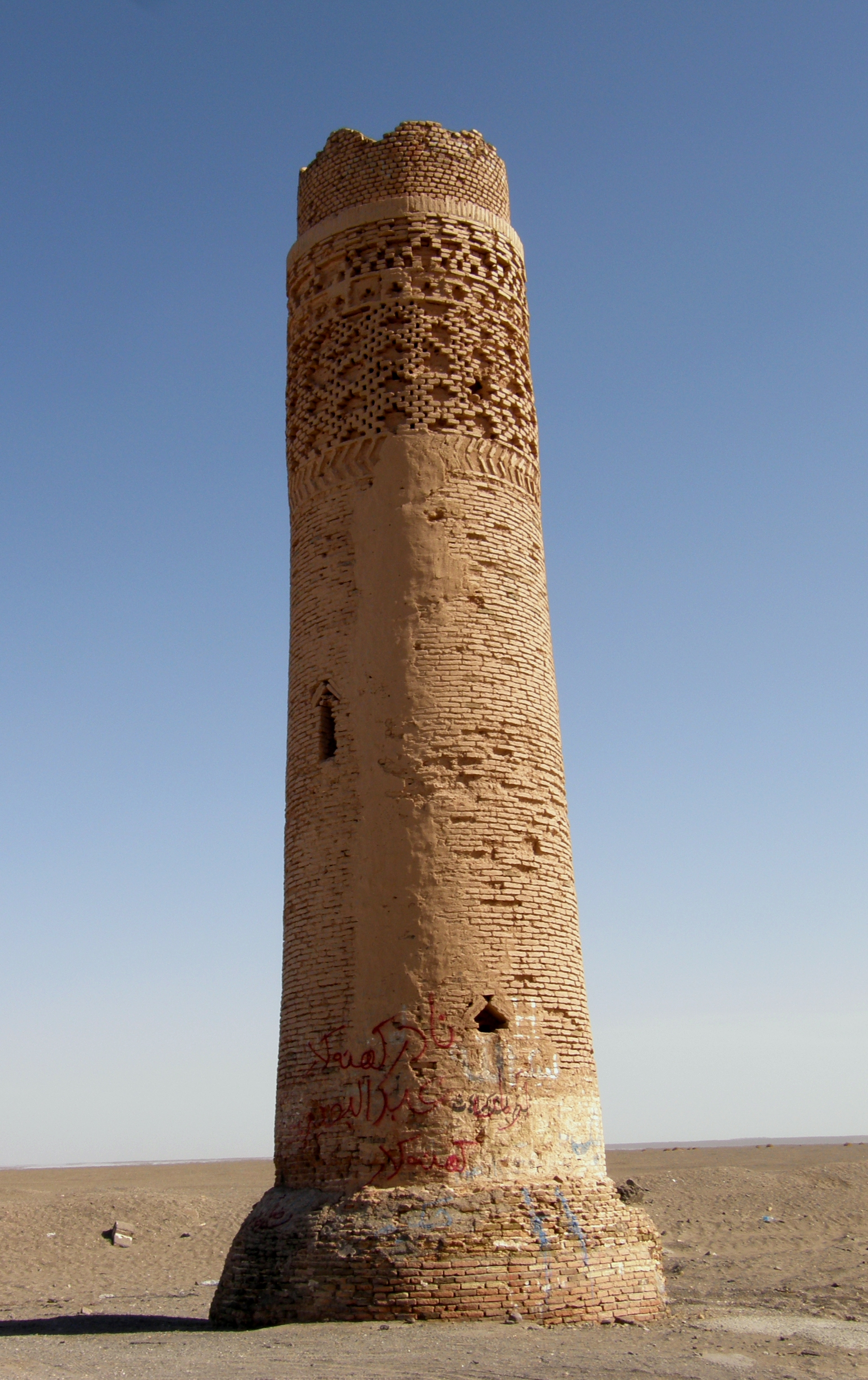 میل نادری